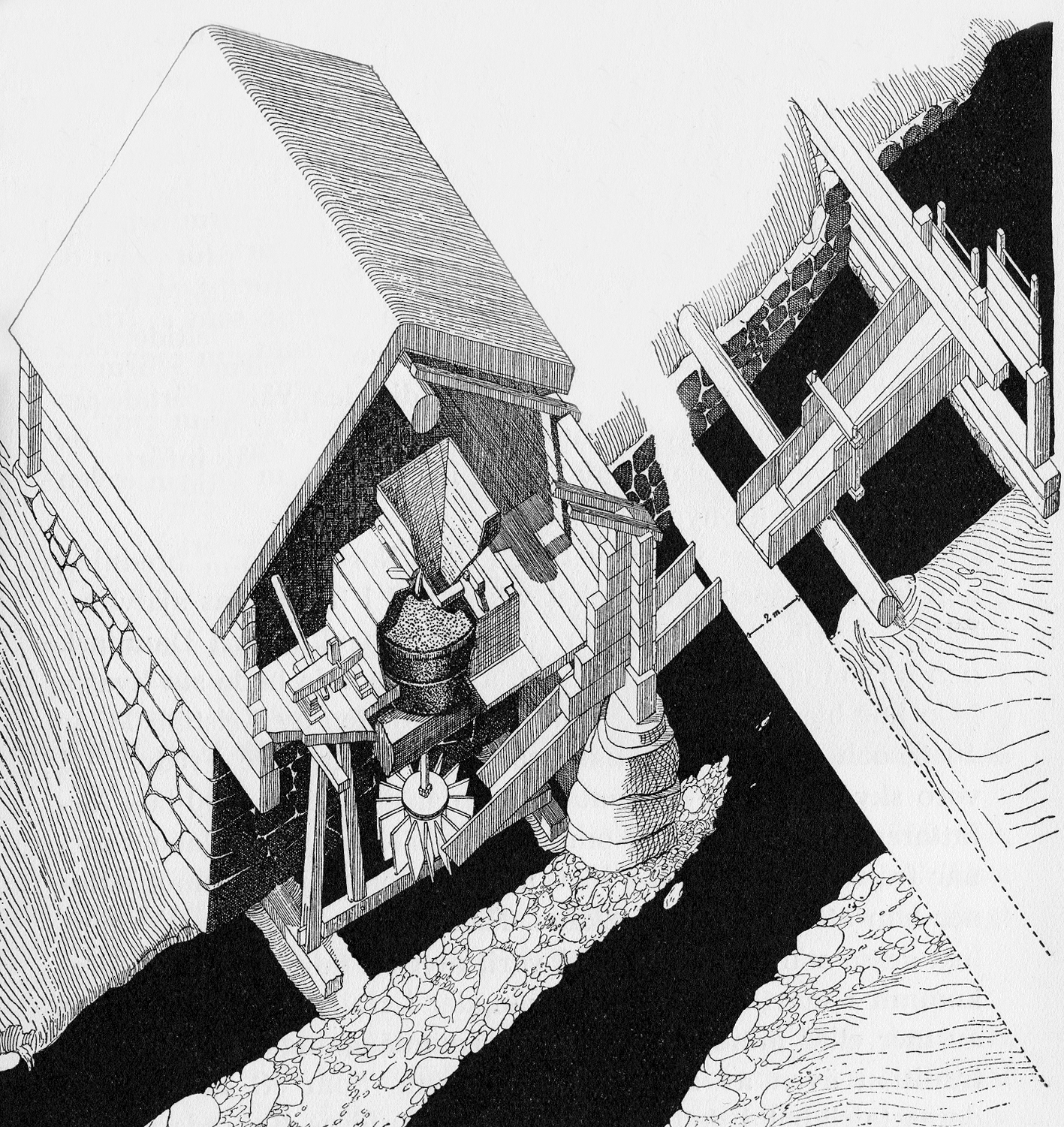 Principskiss över en skvaltkvarn. Harald Nilsson 1938.